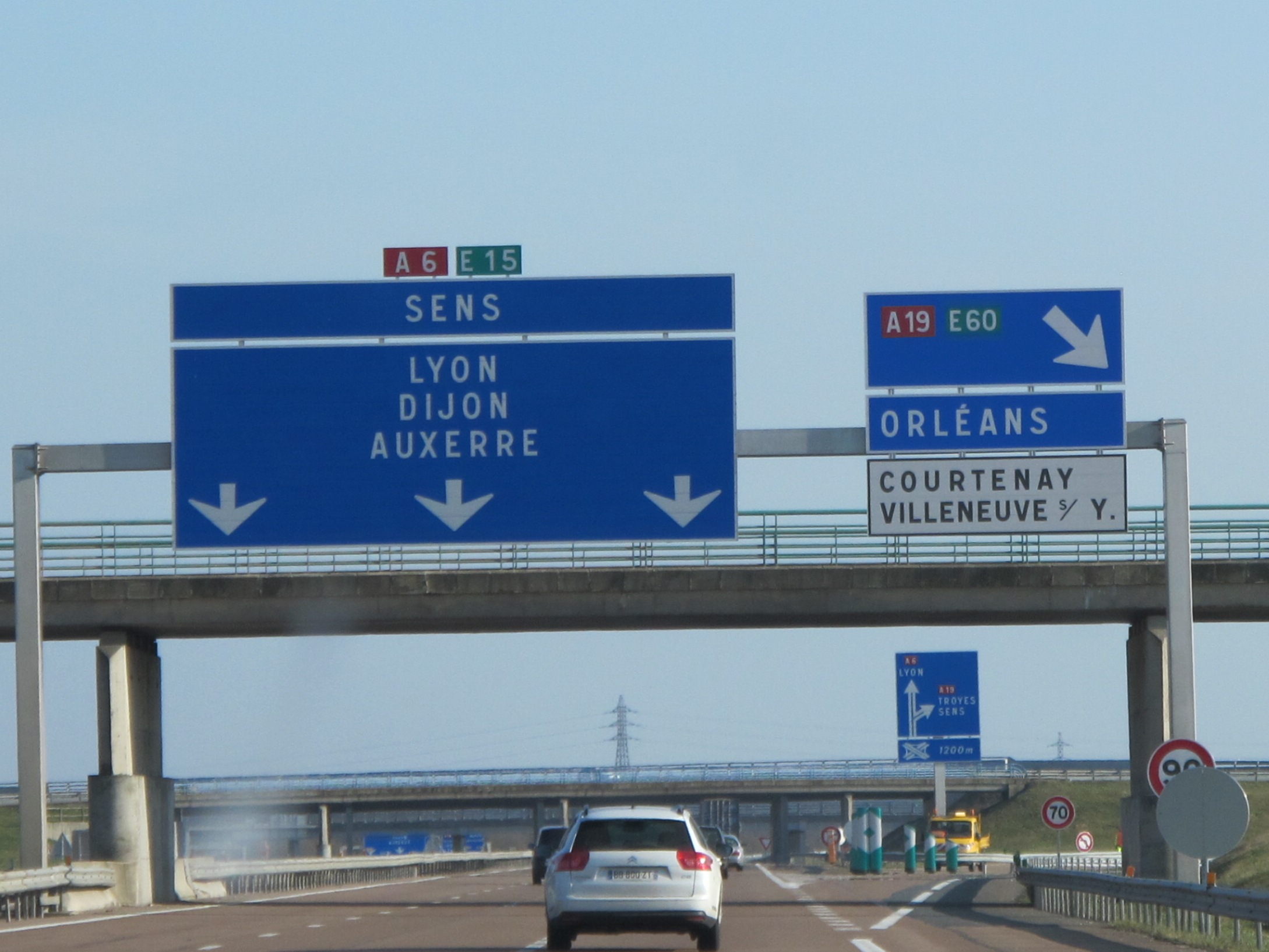 Autoroute A6 (France) dans le sens Paris-Lyon. À l'échangeur de Courtenay sur la commune de Piffonds, panneaux à l'entrée de la voie de jonction avec l'autoroute A19 et avec la sortie de Courtenay et de Villeneuve-sur-Yonne.